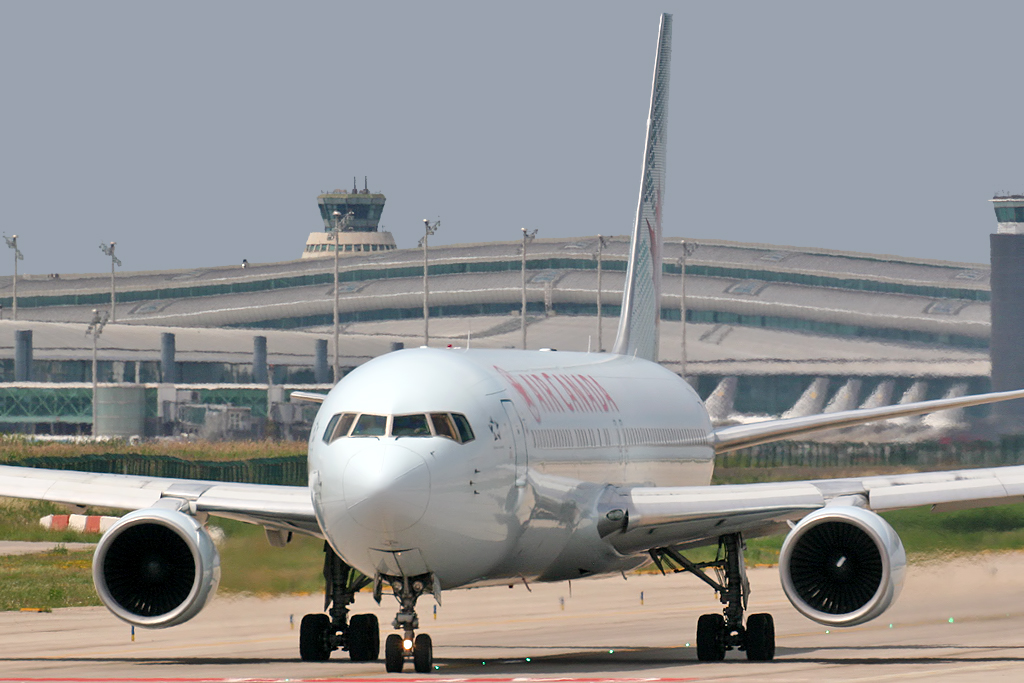 Barcelona El Prat (LEBL/BCN) Airport